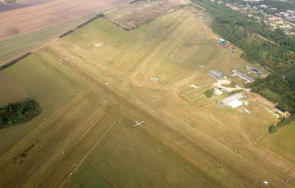 Taget om morgenen fra vores Cessna inden vores åbent hus i klubben 2005